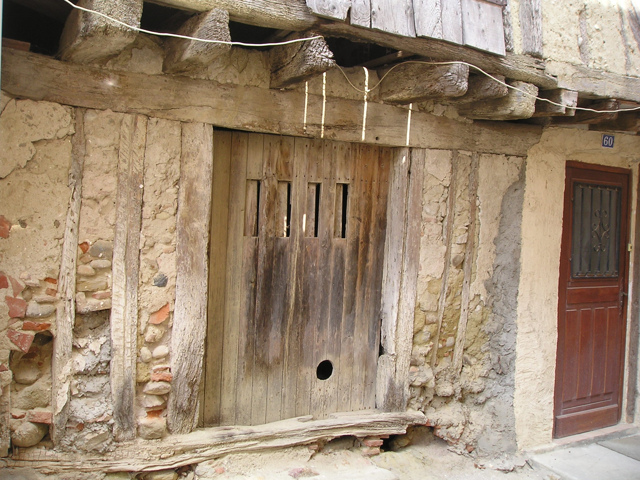 La circulade de Villeneuve-lès-Montréal en juillet 2006.